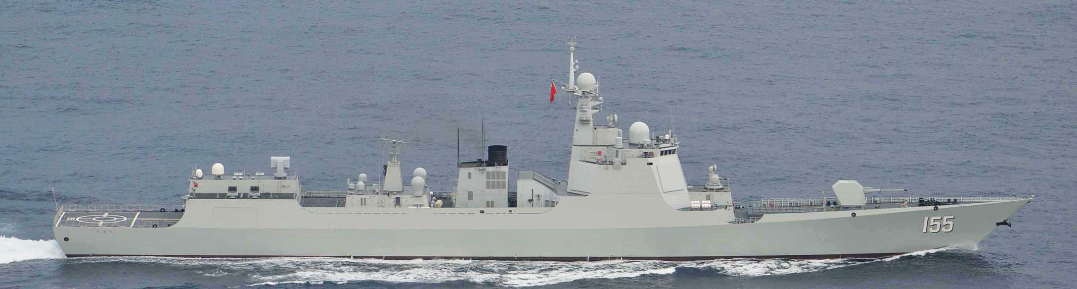 １１月２７日（水）午前８時半頃、海上自衛隊第１航空群所属「Ｐ－３Ｃ」（鹿屋）が、口永良部島（鹿児島県）の西約１００ｋｍの海域を東進する中国海軍ルーヤンⅢ級ミサイル駆逐艦１隻、ジャンカイⅡ級フリゲート２隻及びフチ級補給艦１隻の合計４隻を確認した。 その後、これらの艦艇が大隅海峡を東進し、太平洋へ向けて航行したことを確認した。